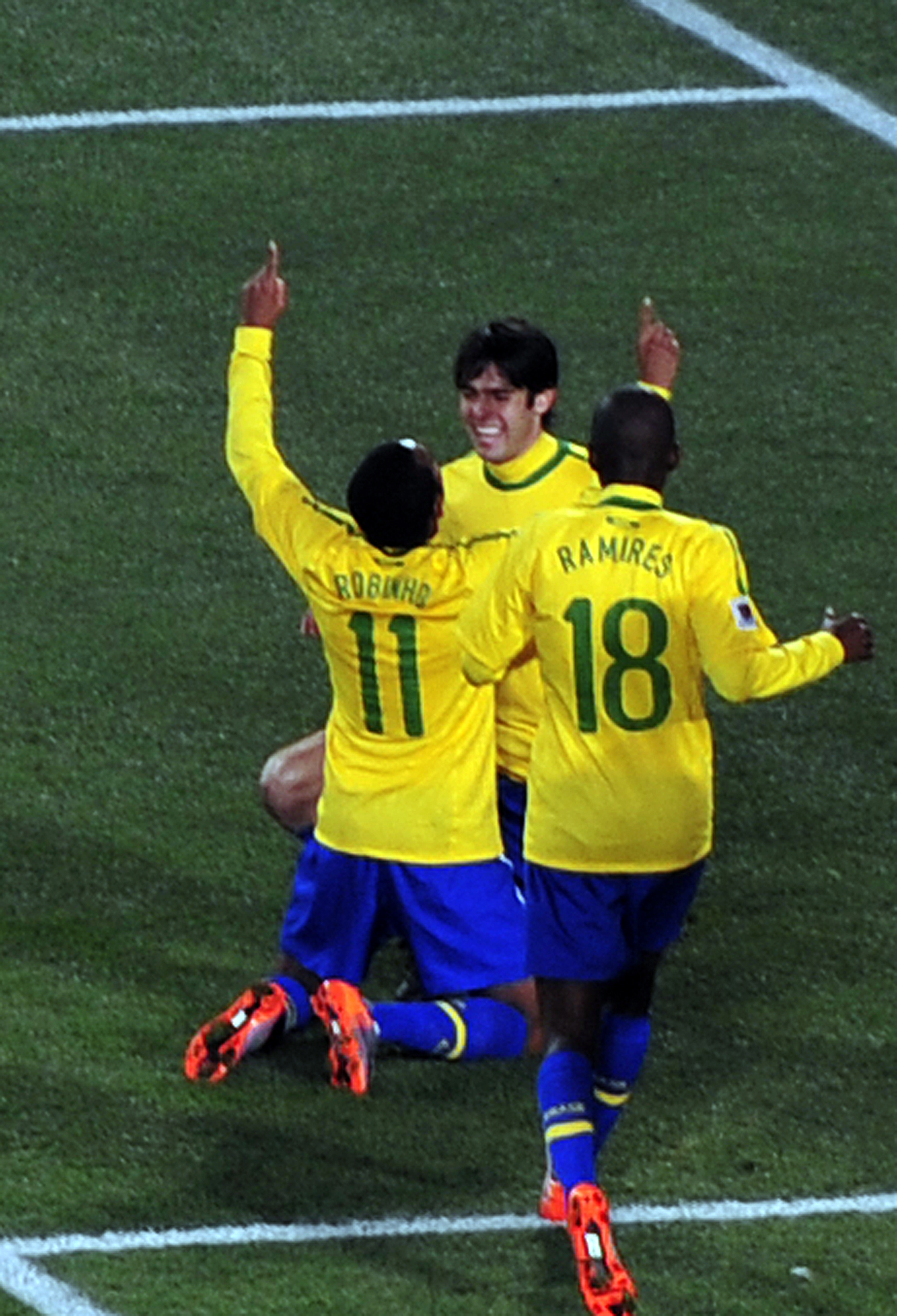 Joanesburgo - Com a vitória de 3 x 0 sobre o Chile, a seleção brasileira passa para as quartas de final da Copa do Mundo.